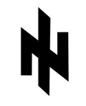 Símbol rúnic usat pel partit nazi alemany, usat pel Front Nacional Identitari en el seu logotip. És un símbol de tipus rúnic comú per referir-se al símbol Wolfsangel i Eihwaz, usat per grups i partits d'ultra dreta, i usat al logotip del partit polític Front Nacional Identitari - Recuperem Espanya. Símbol d'ús comú, usat pel Front Nacional Identitari.